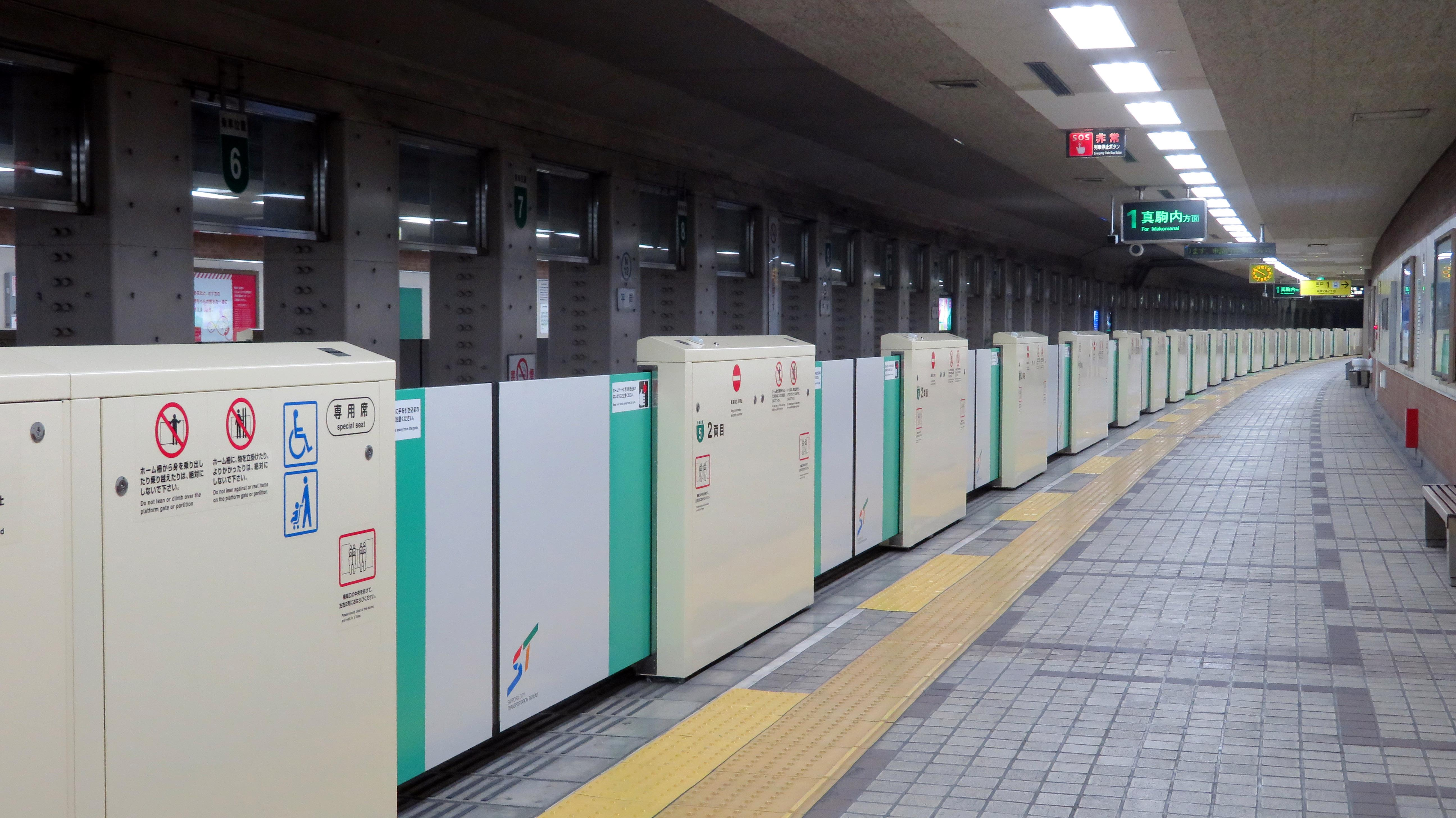 平岸駅ホーム Canon PowerShot SX720 HS